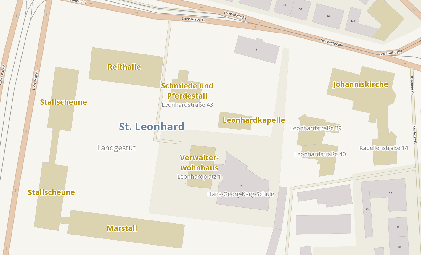 Plan von St. Leonhard in Braunschweig. Baudenkmale sind gelblich eingezeichnet.